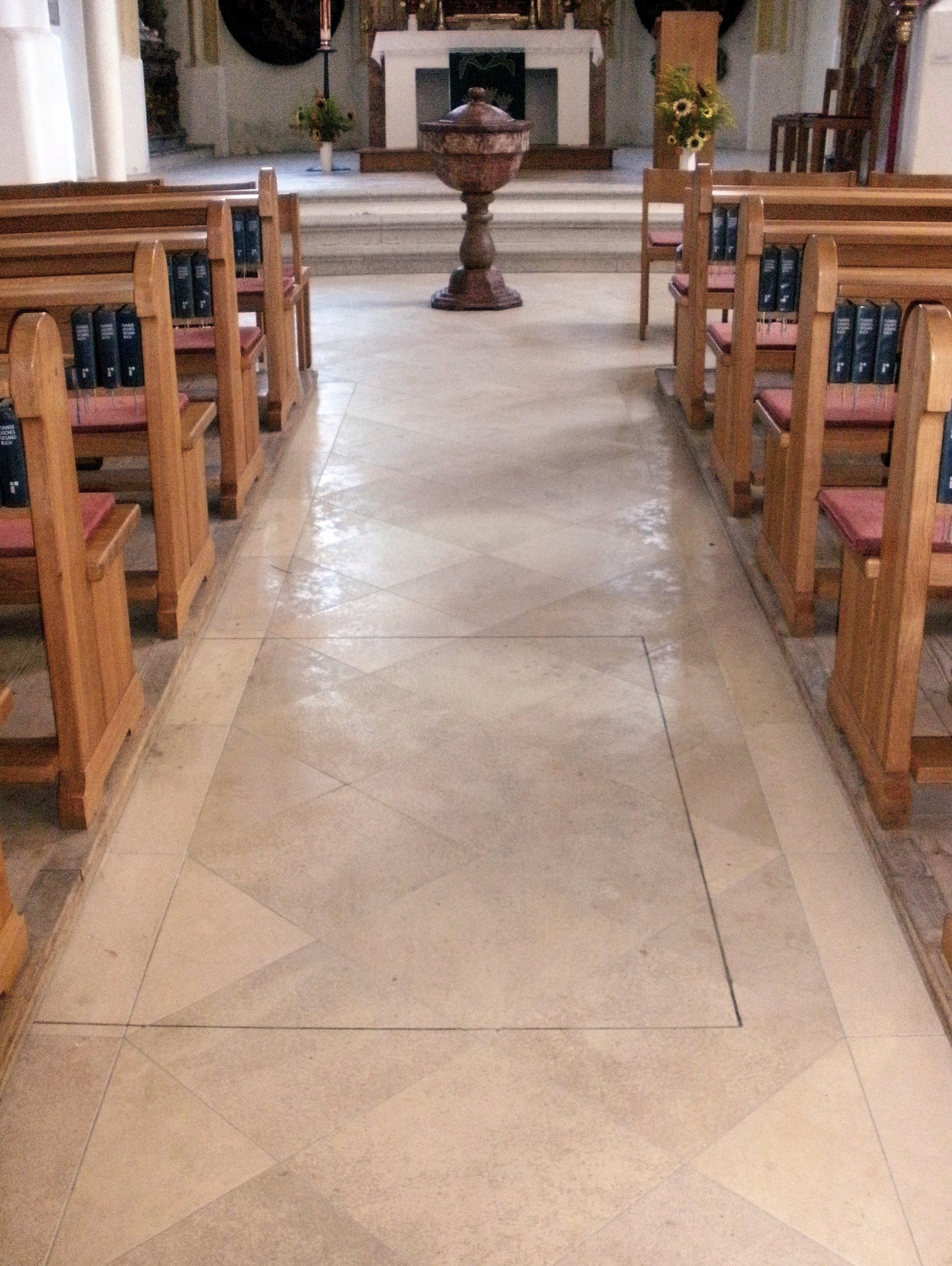 Marktkirche, Ortenburg: Mittelgang der Kirche mit Eingang zur Gruft der Grafen von Ortenburg im Bodenpflaster